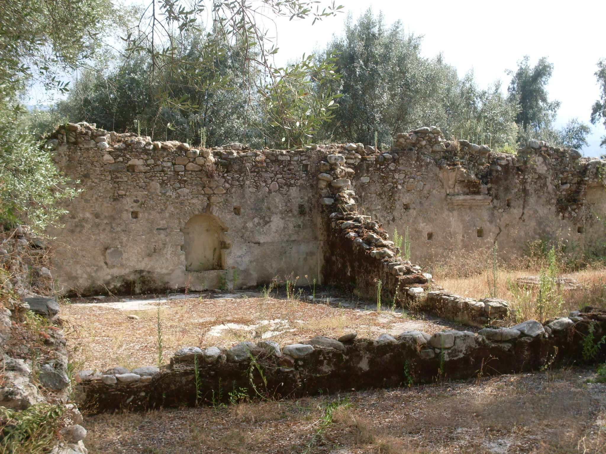 Resti del Convento dei Paolotti dentro le mura.